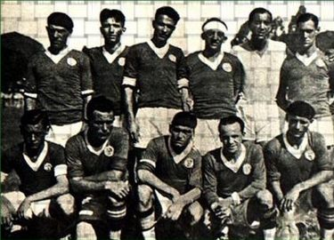 Palestra Itália (Antiga denominação da Sociedade Esportiva Palmeiras) em 1932